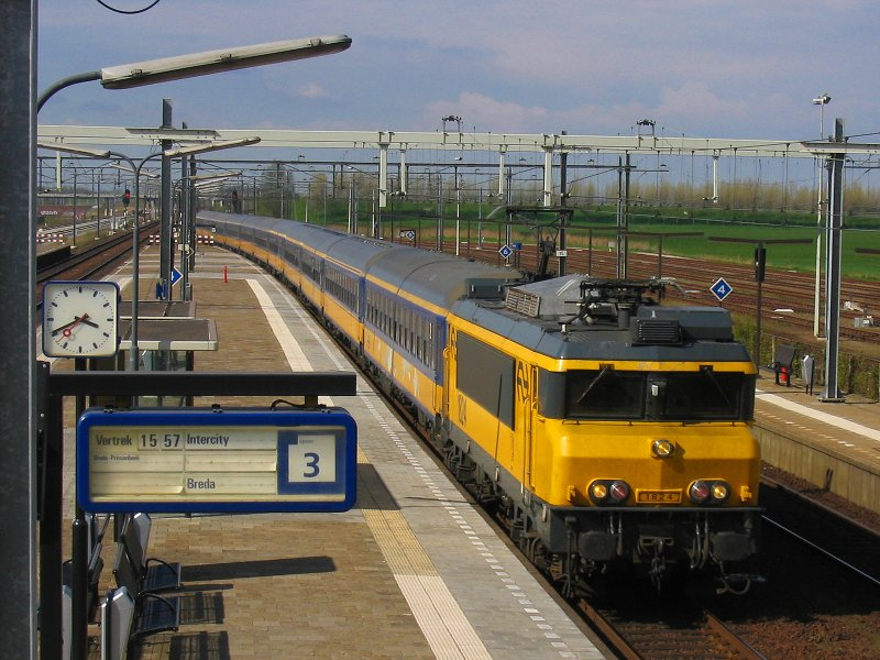 La 1824 des NS (Nederlandse Spoorwegen) passe à Lage Zwalue à toute vitesse